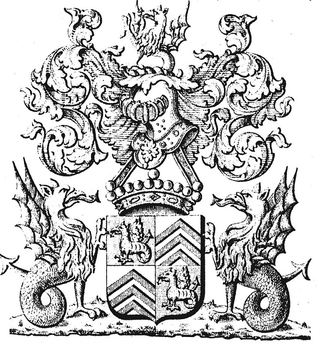 Paenobil familia Draeck